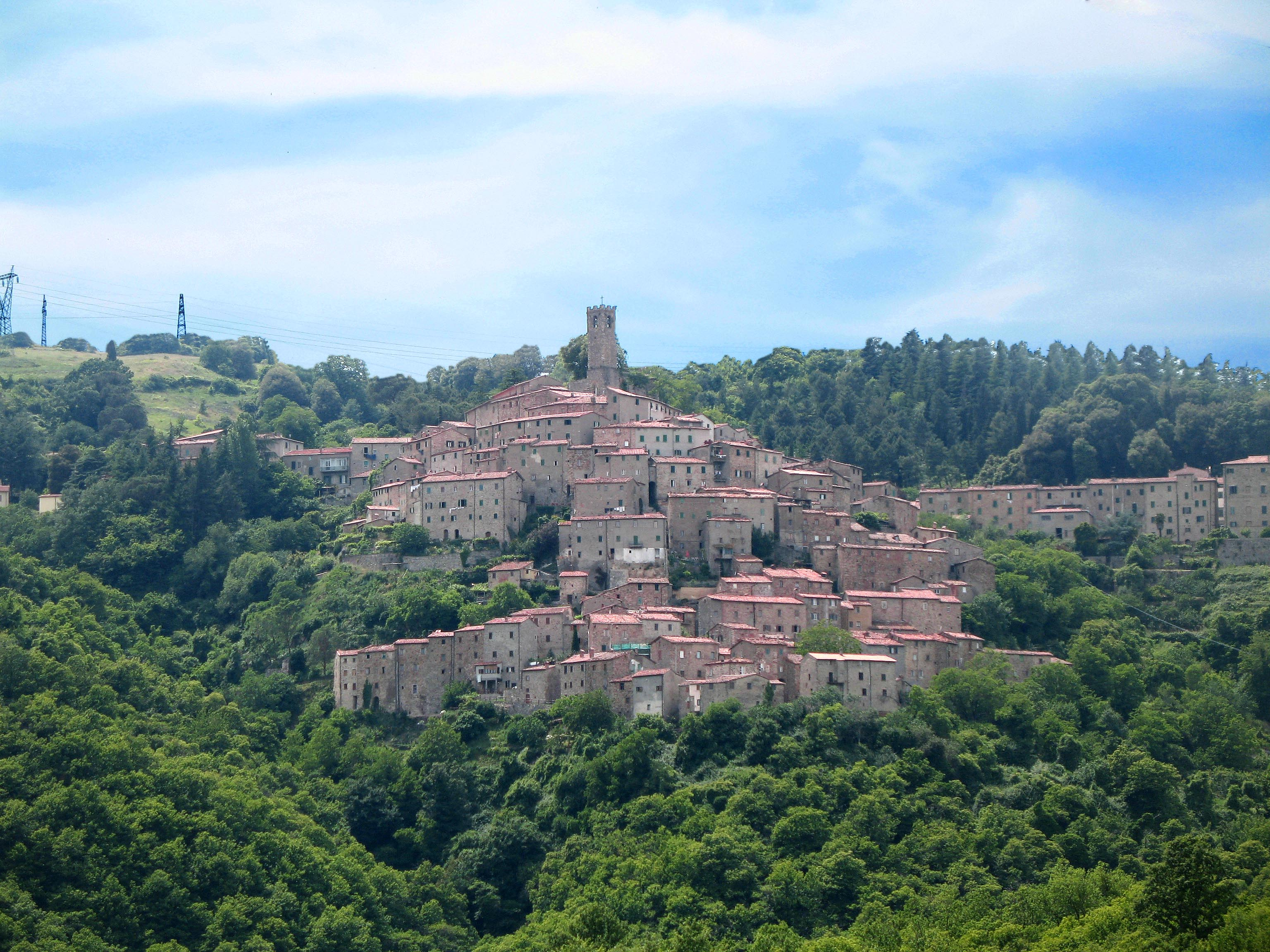 Panorama di Castelnuovo Val di Cecina